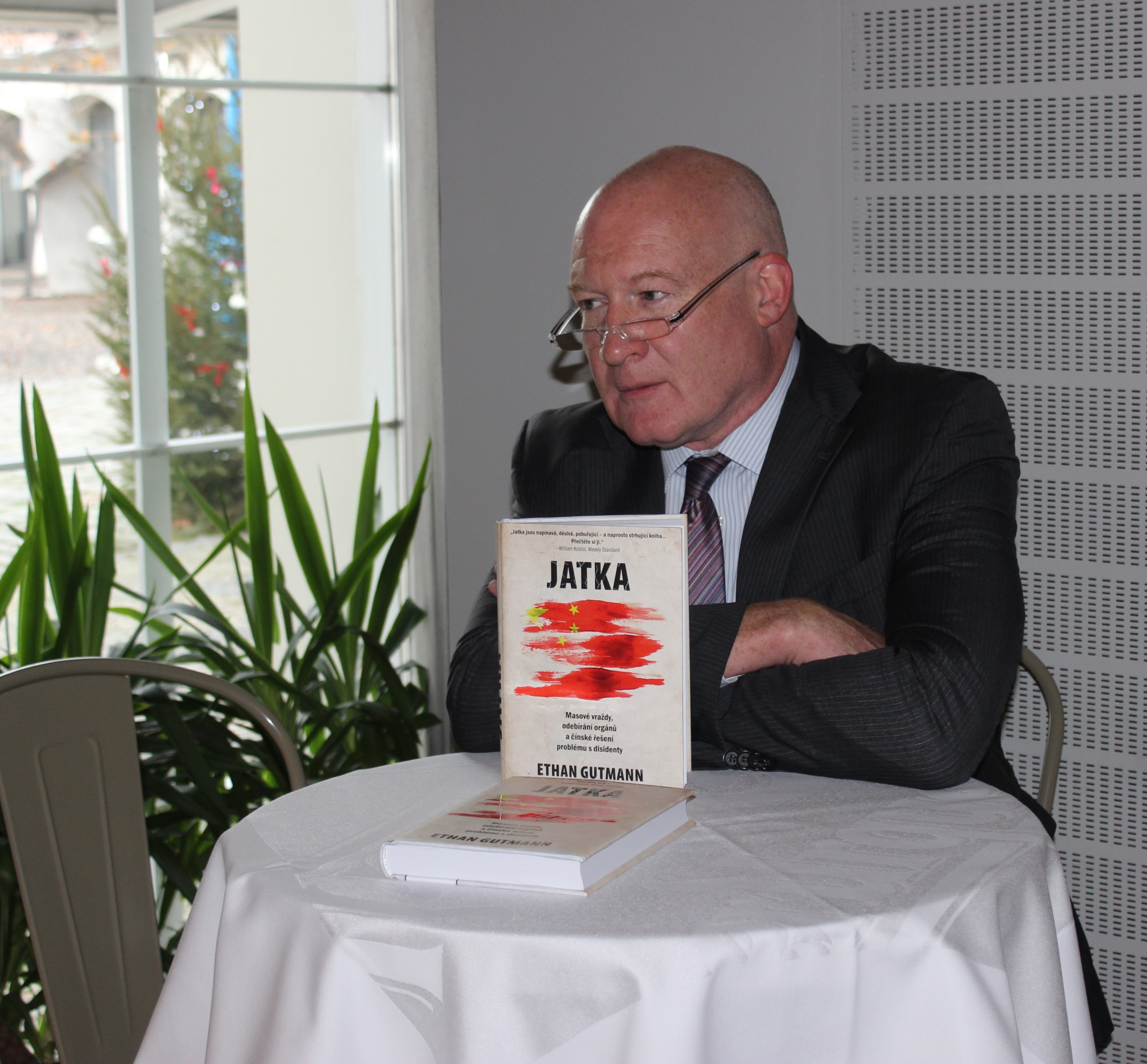 Ethan Gutmann při tiskové konferenci v restauraci Sovovy mlýny (Muzeum Kampa), 12. ledna 2016.